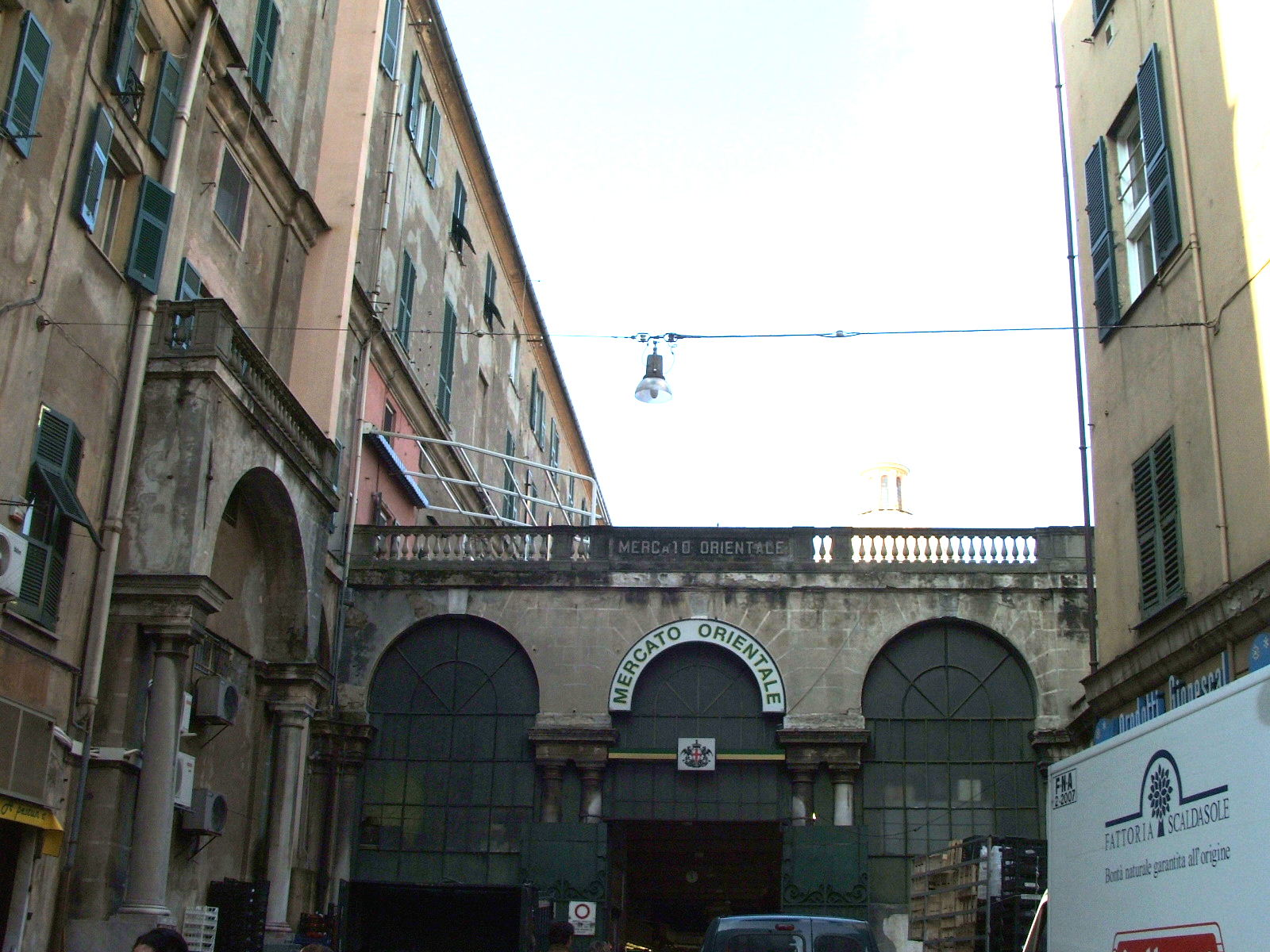 Immagine dalla città di Genova Mercato Orientale di Genova